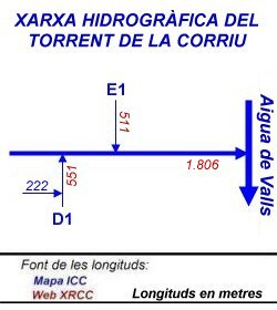 Esquema de la xarxa hidrogràfica del Torrent de la Corriu, tributari de l'Aigua de Valls.